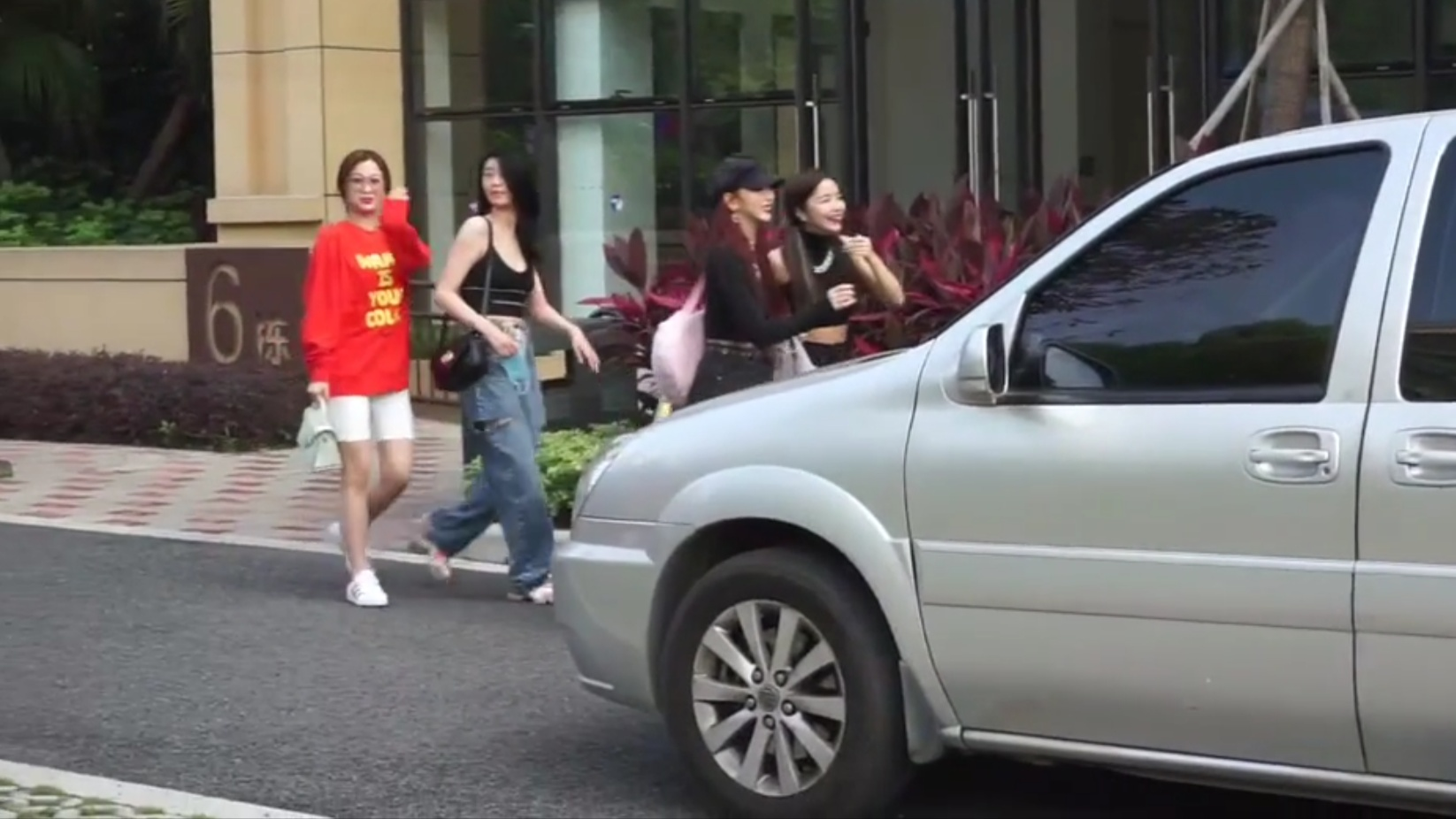 中文（中国大陆）: 20200524 安崎 孔雪儿 赵小棠 虞书欣